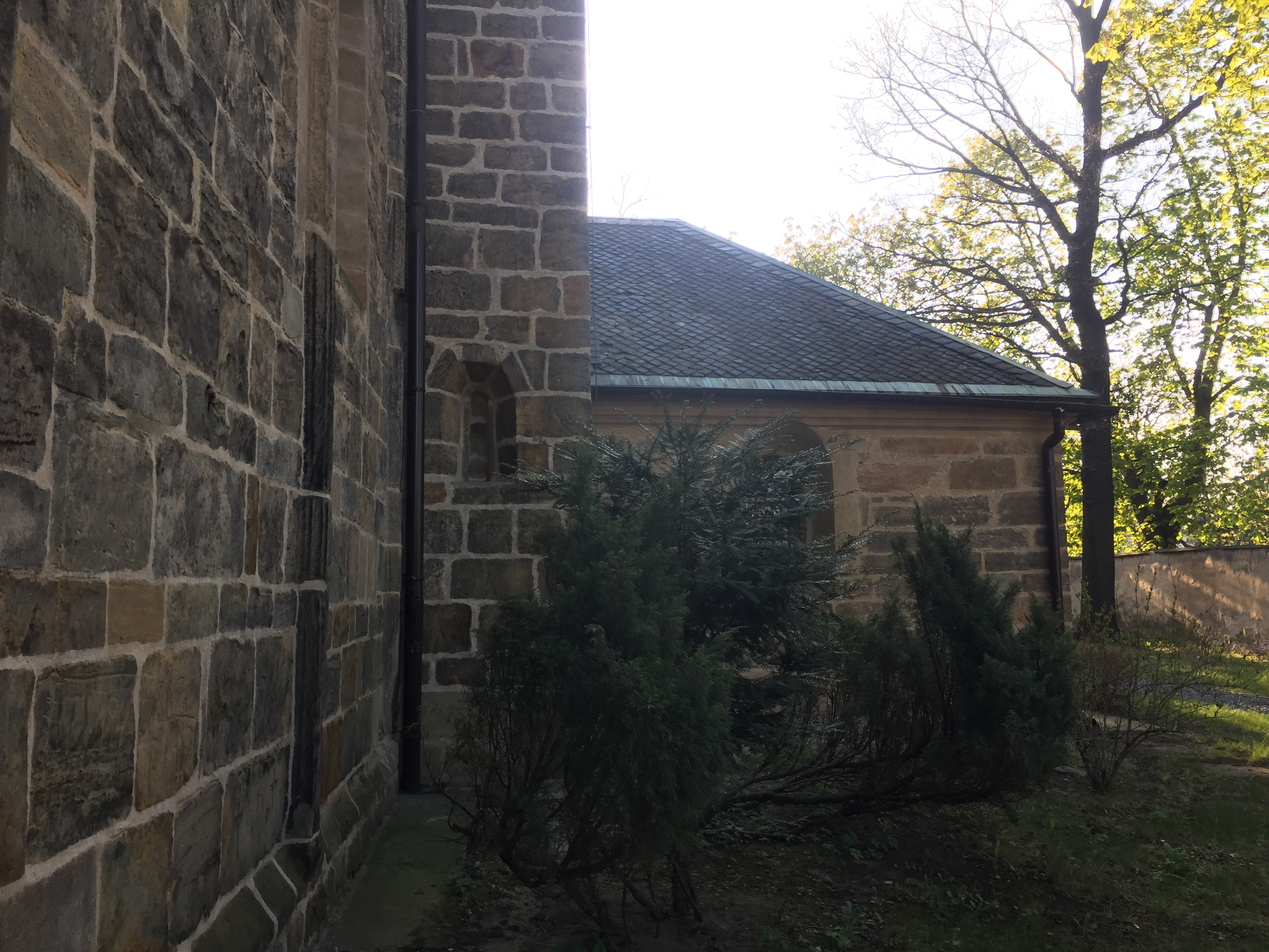 skrytá střílna na severní straně kostela